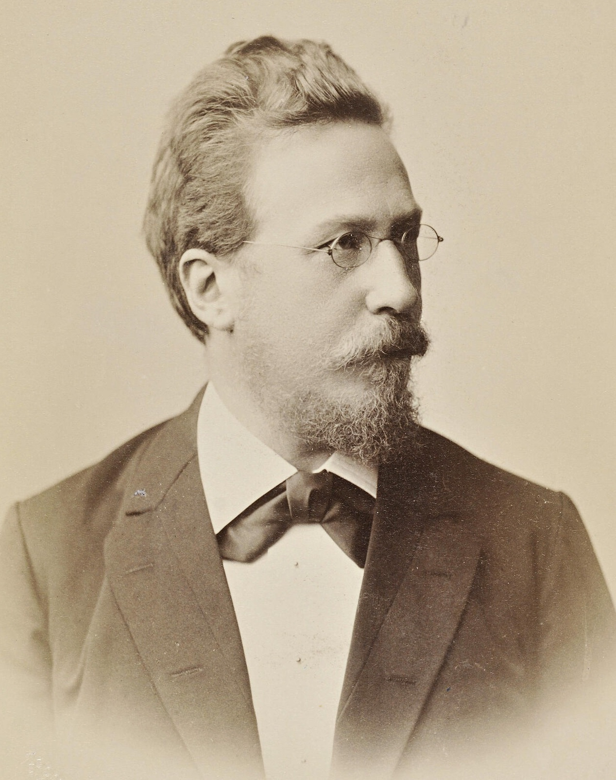 Quelle